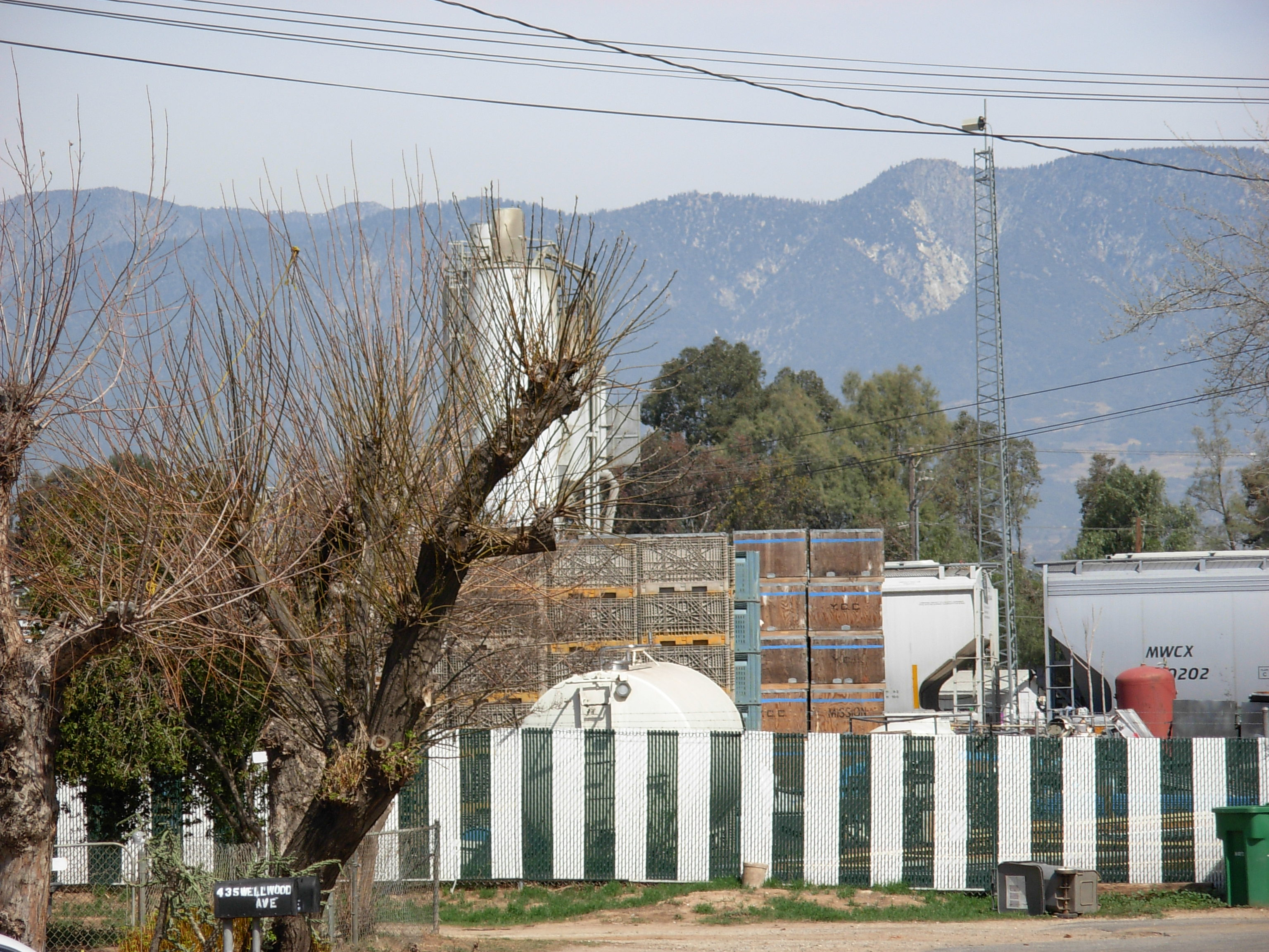 Beaumont, CA